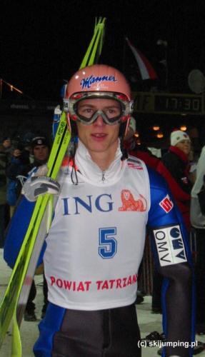 Christian Nagiller - austriacki skoczek narciarski podczas Pucharu Świata w skokach narciarskich Zakopane 2003.